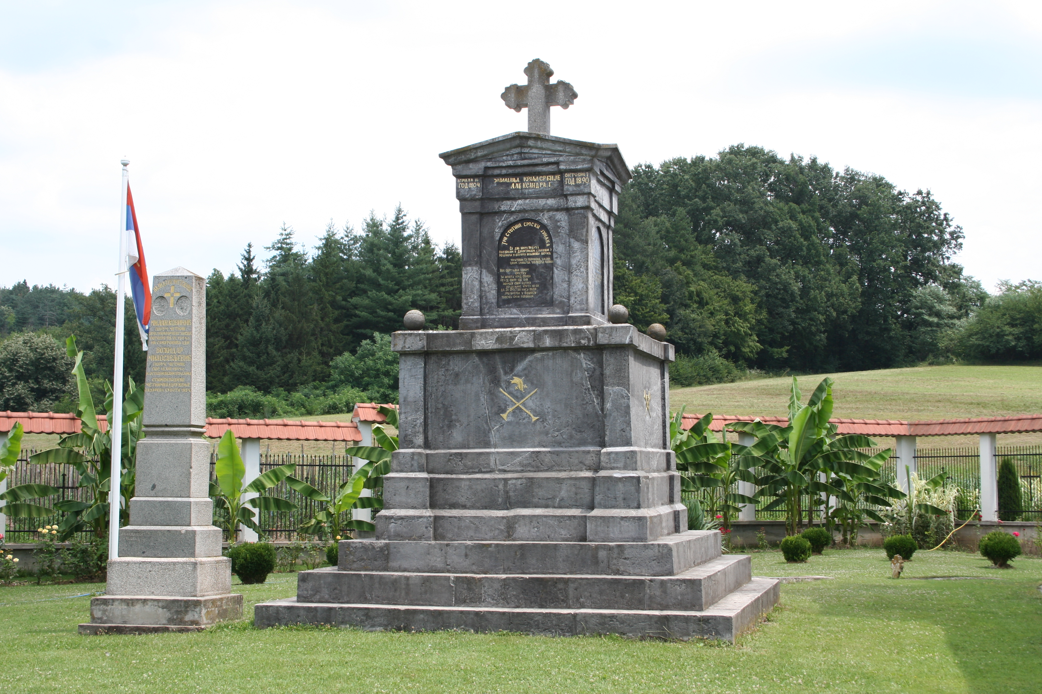 Manastir Čokešina